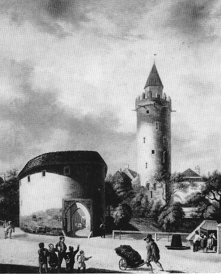 Wendischer Turm in Bautzen um 1839. Hornjoserbsce: Serbska wěža w Budyšinje wokoło 1839.